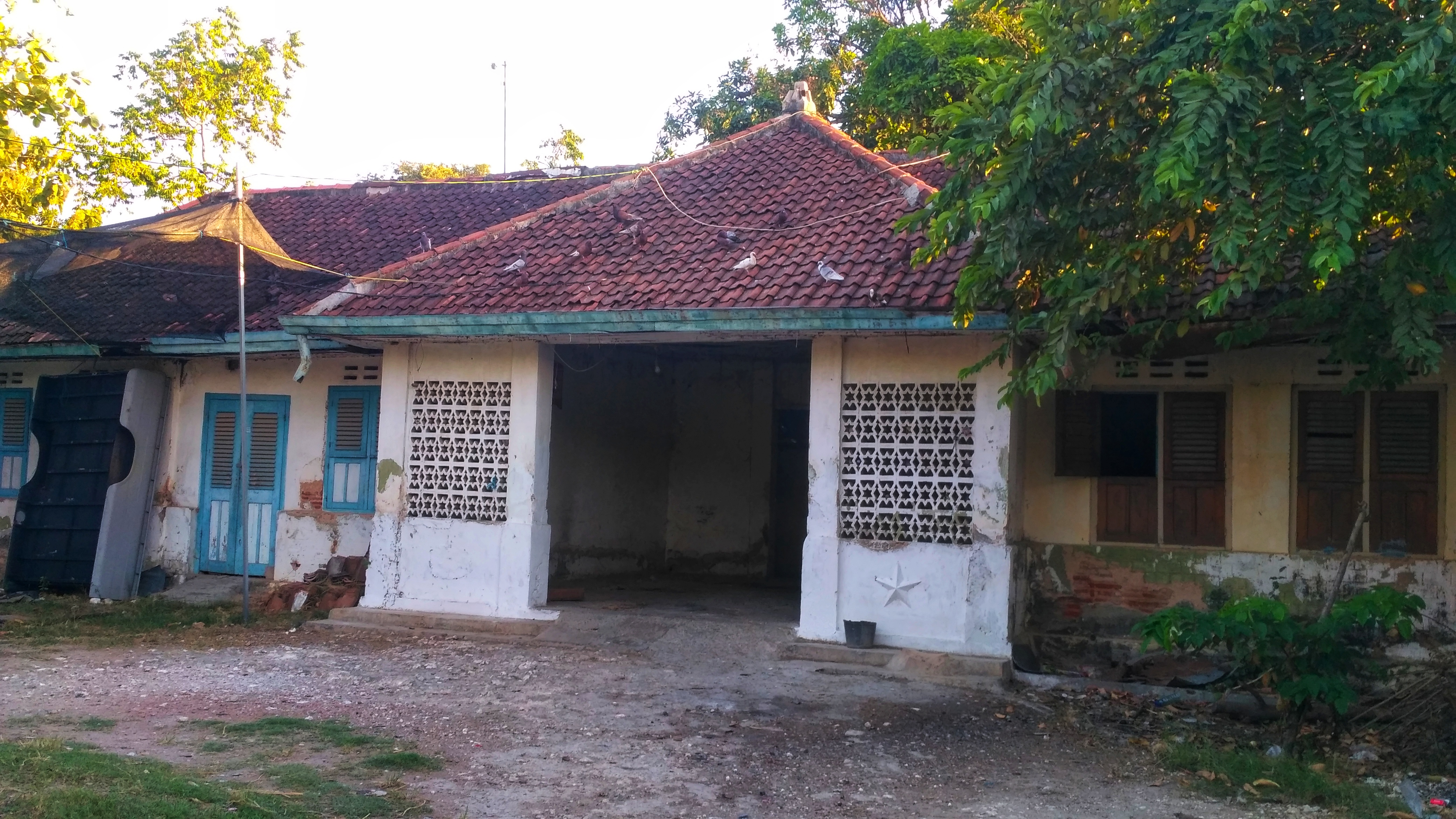 Tampak depan bekas bangunan Stasiun Merakurak.